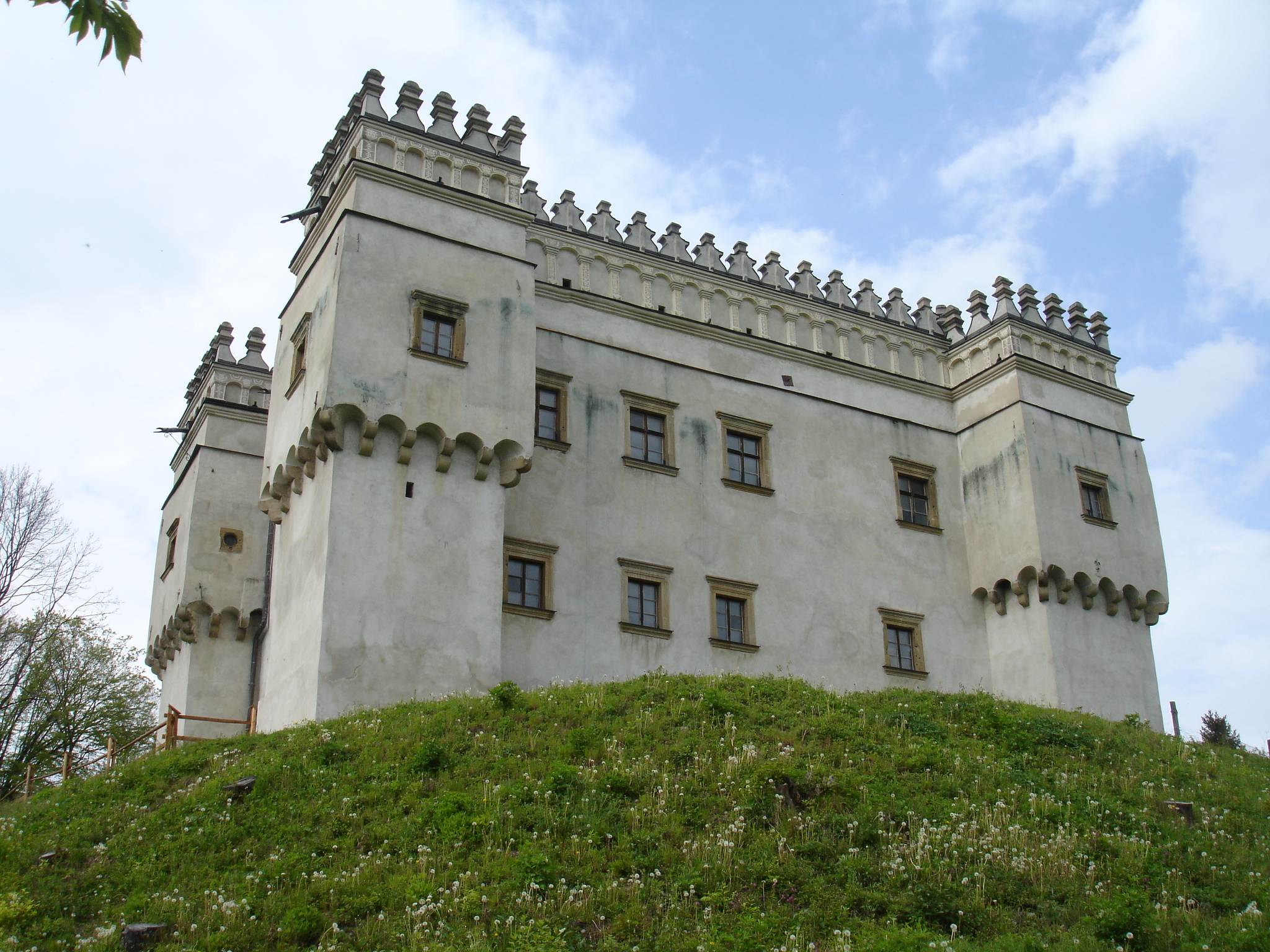 Szymbark castle